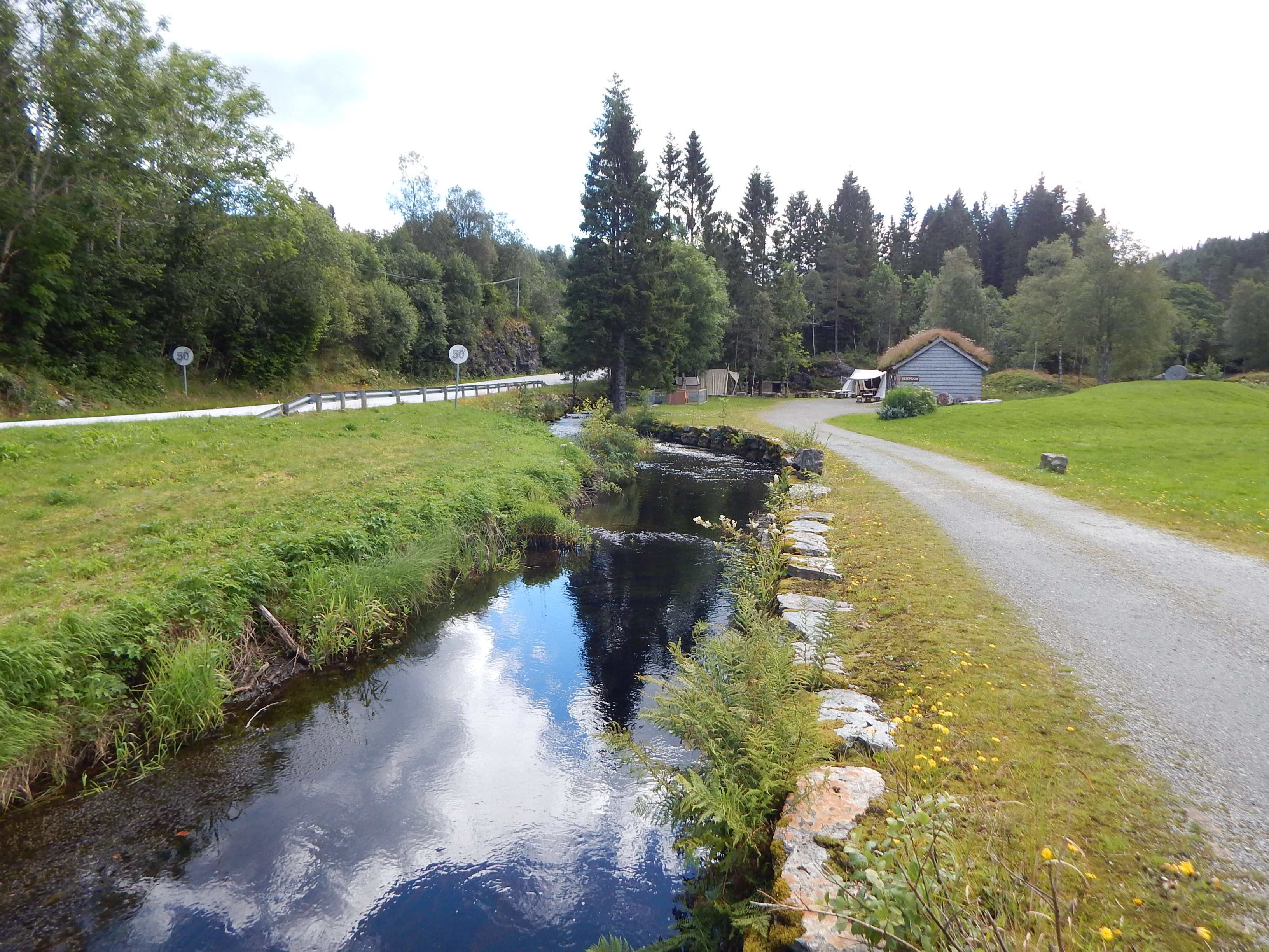 Kvernsteinsparken i Hyllestad med primær fylkesvei 607 i bakgrunnen